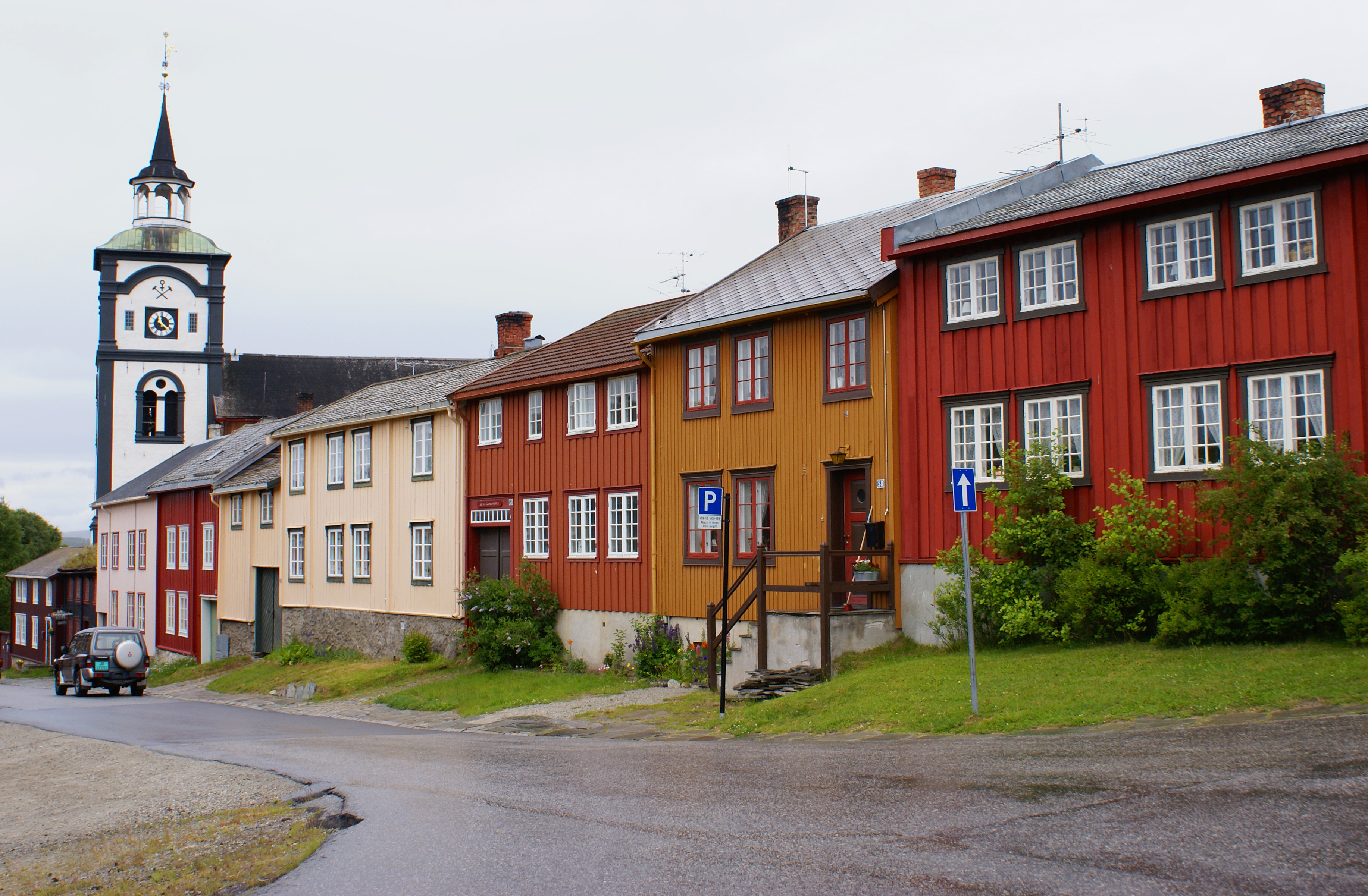 From Røros - Kjerkgata